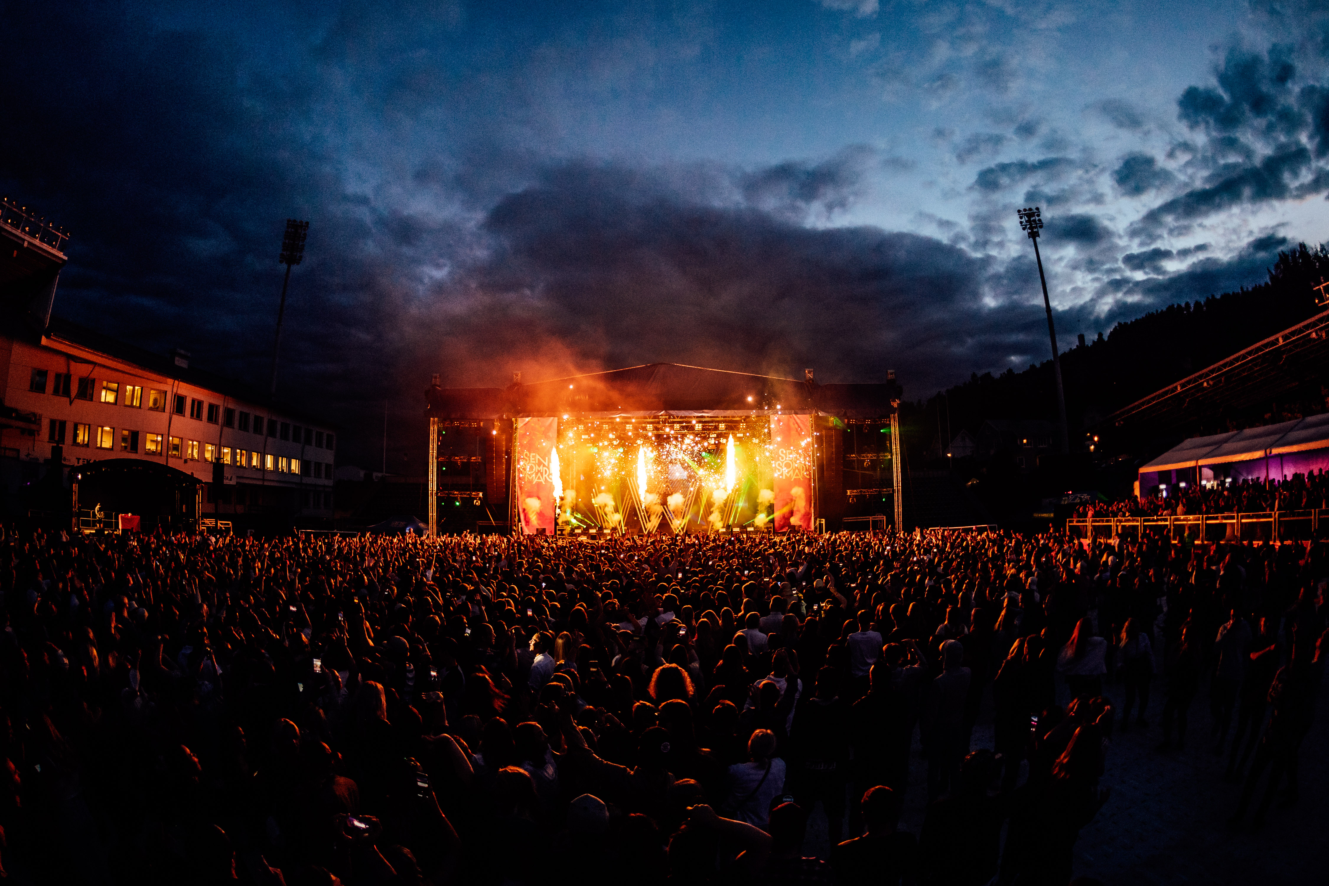 Uppträdande på Sensommar! Festival i Sundsvall